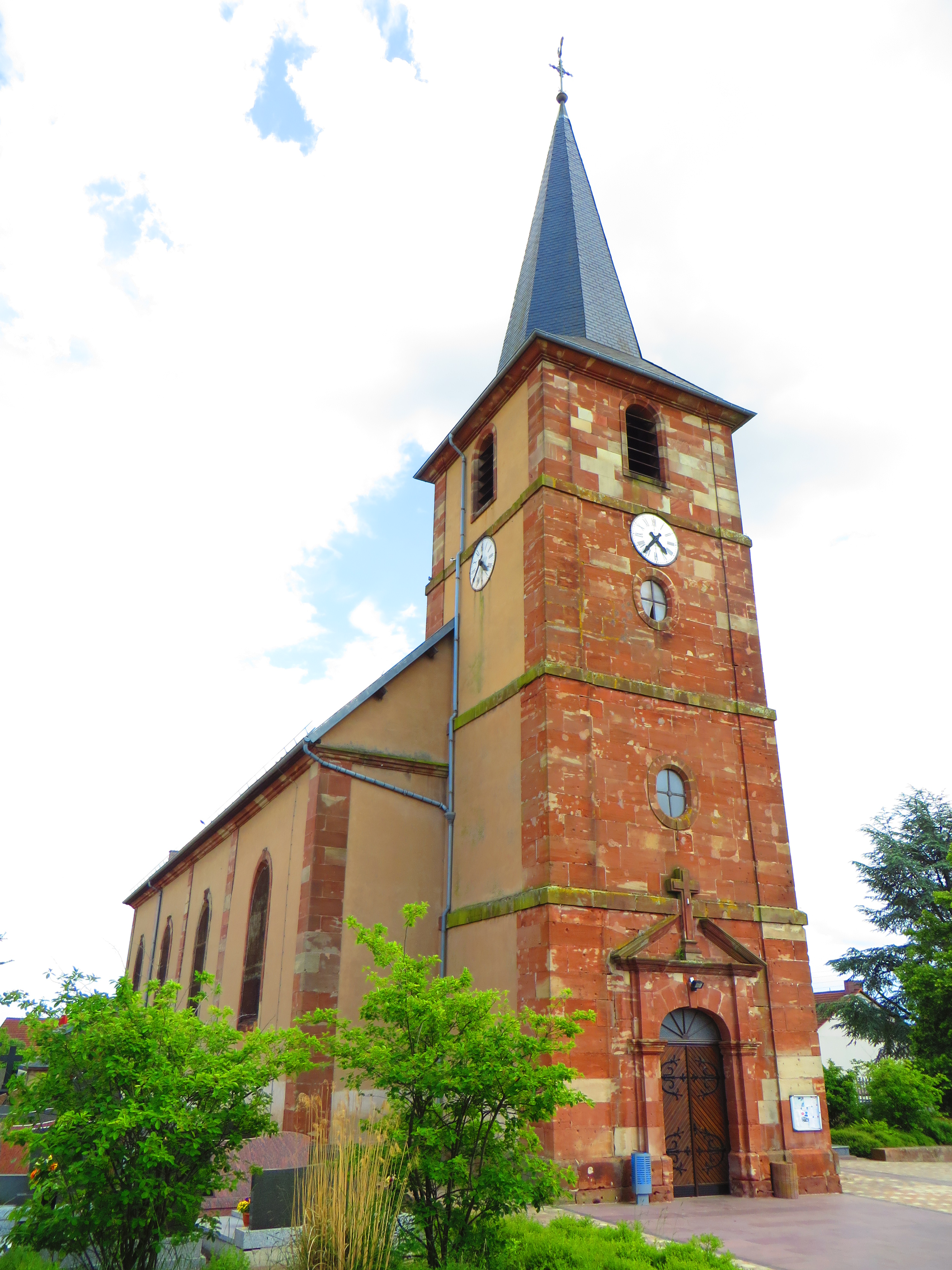 Kerbach Église Saint-Remi